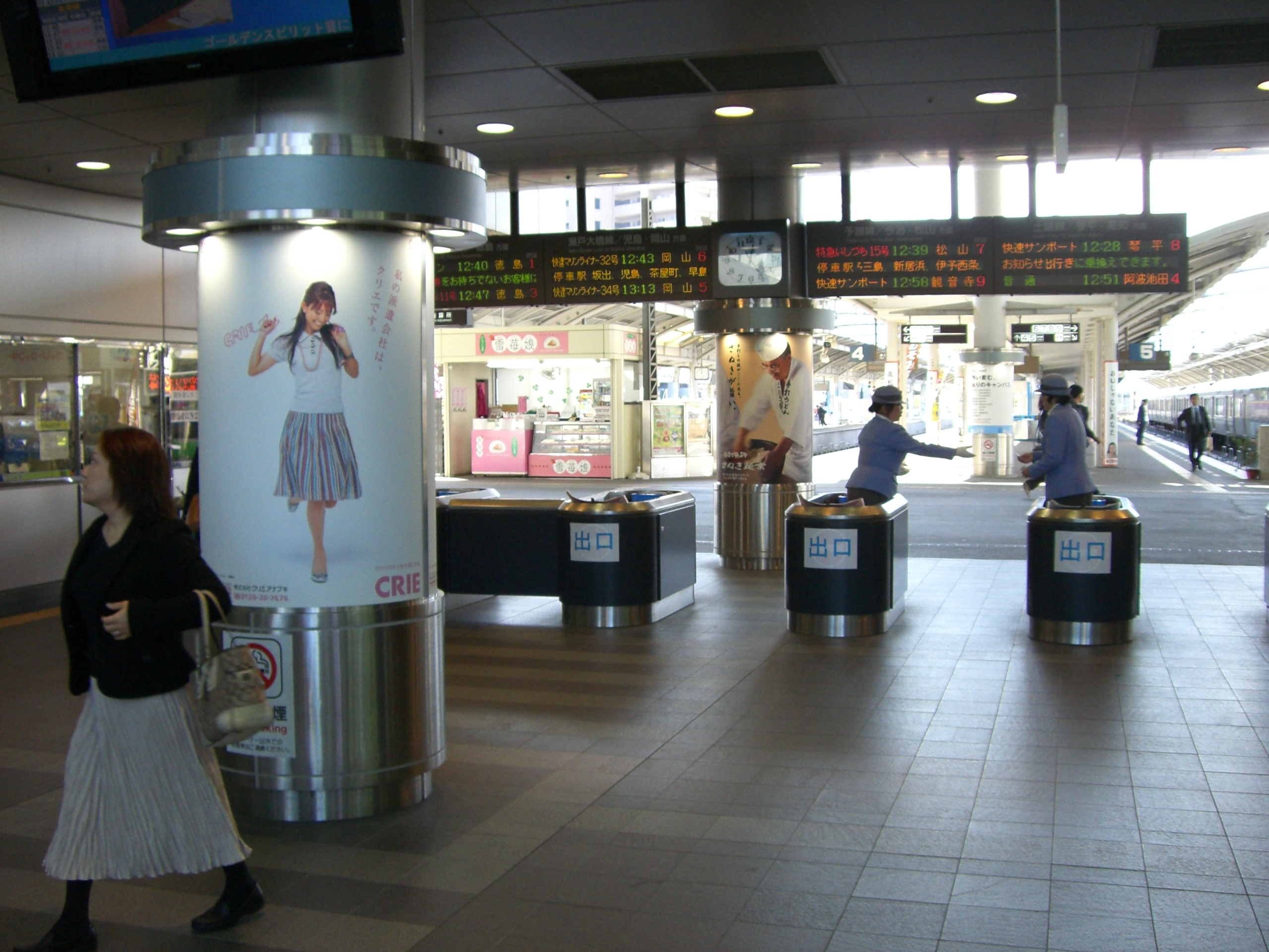 JR Shikoku Takamatsu Station